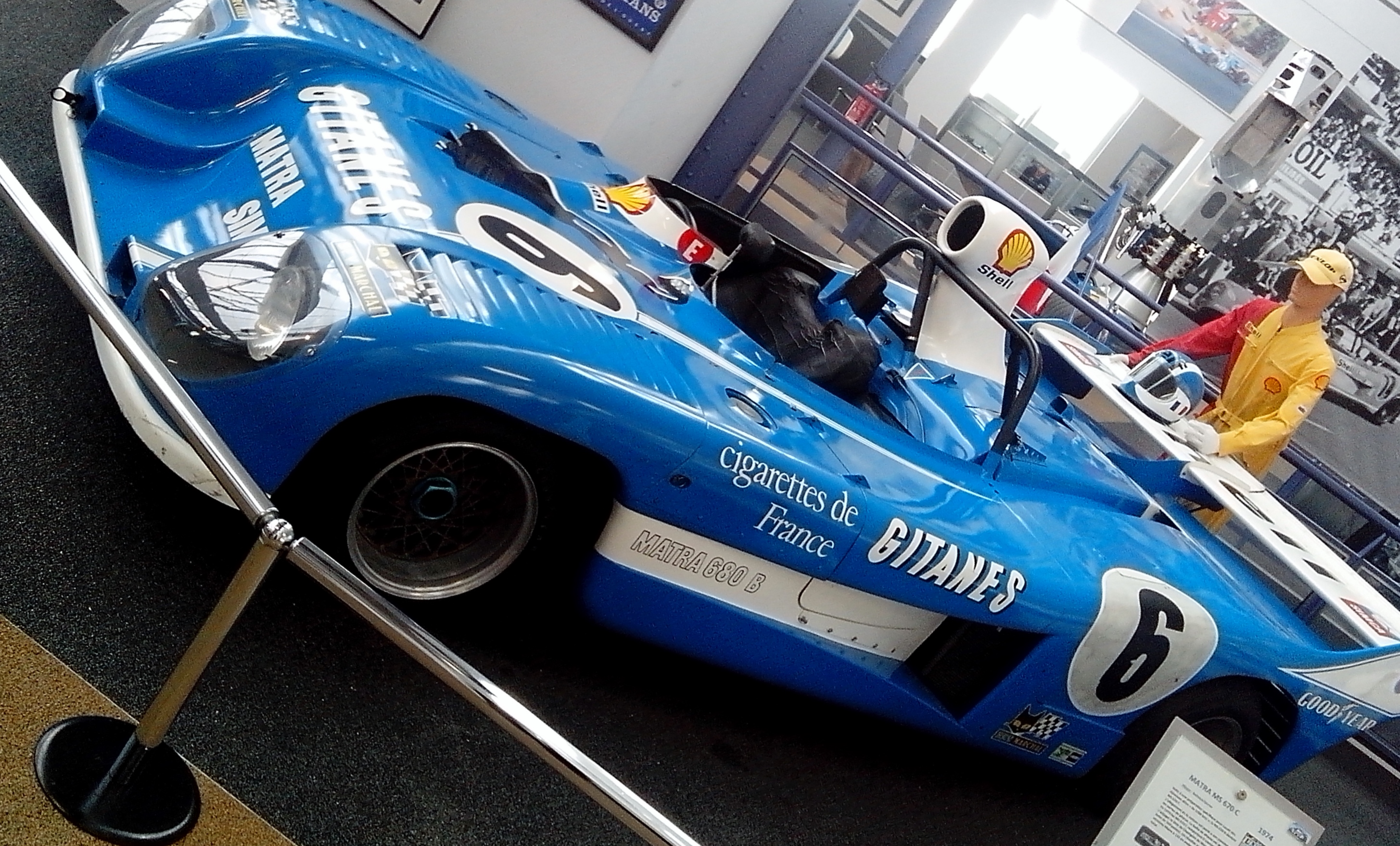 Collection de l'Espace Automobiles Matra